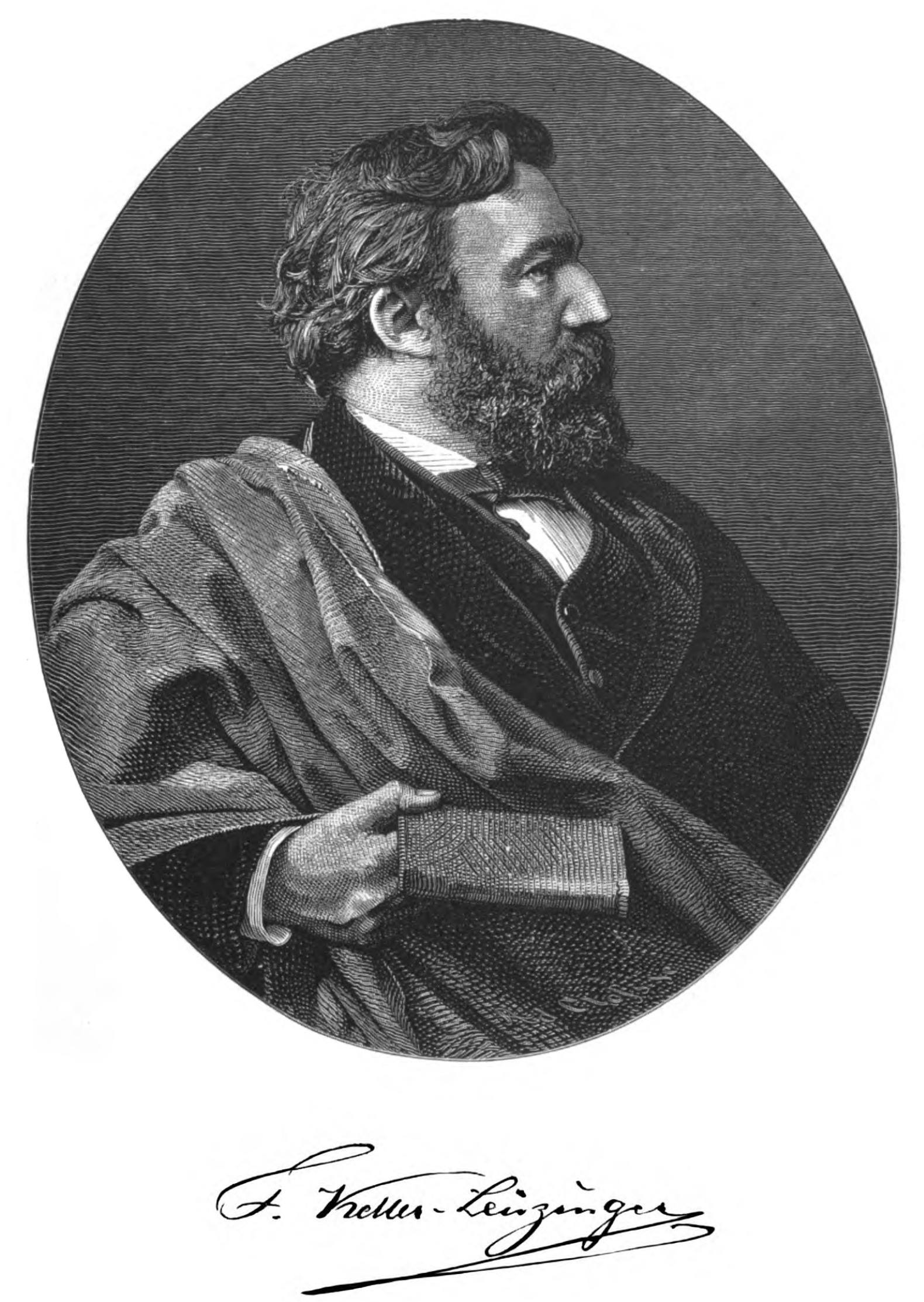 Porträt: Franz Keller-Leuzinger. In: Vom Amazonas und Madeira. Skizzen und Beschreibungen aus dem Tagebuche einer Explorationsreise. Mit zahlreichen nach den eigenen Skizzen vom Verfasser auf Holz gezeichneten und in der xylographischen Anstalt von A. Cloß ausgeführten Illustrationen. A. Kröner, Stuttgart 1874